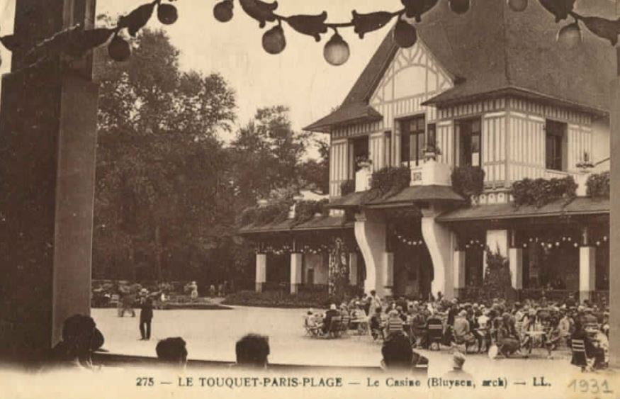 Le Touquet-Paris-Plage - cp - Le casino (Bluysen architecte) en 1931